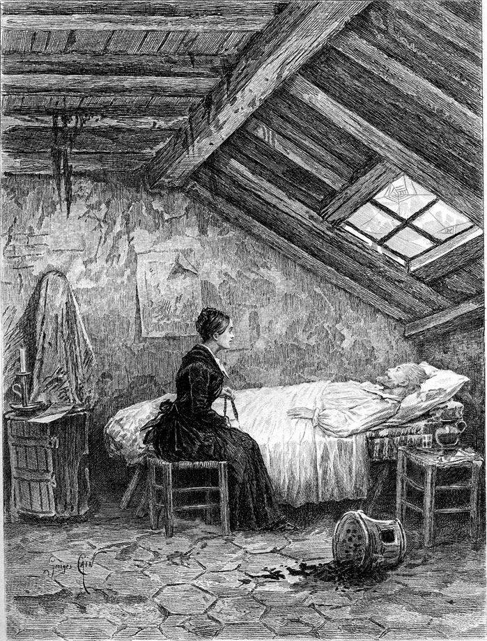 Title page of Honoré de Balzac's Cousin Bette (1846).